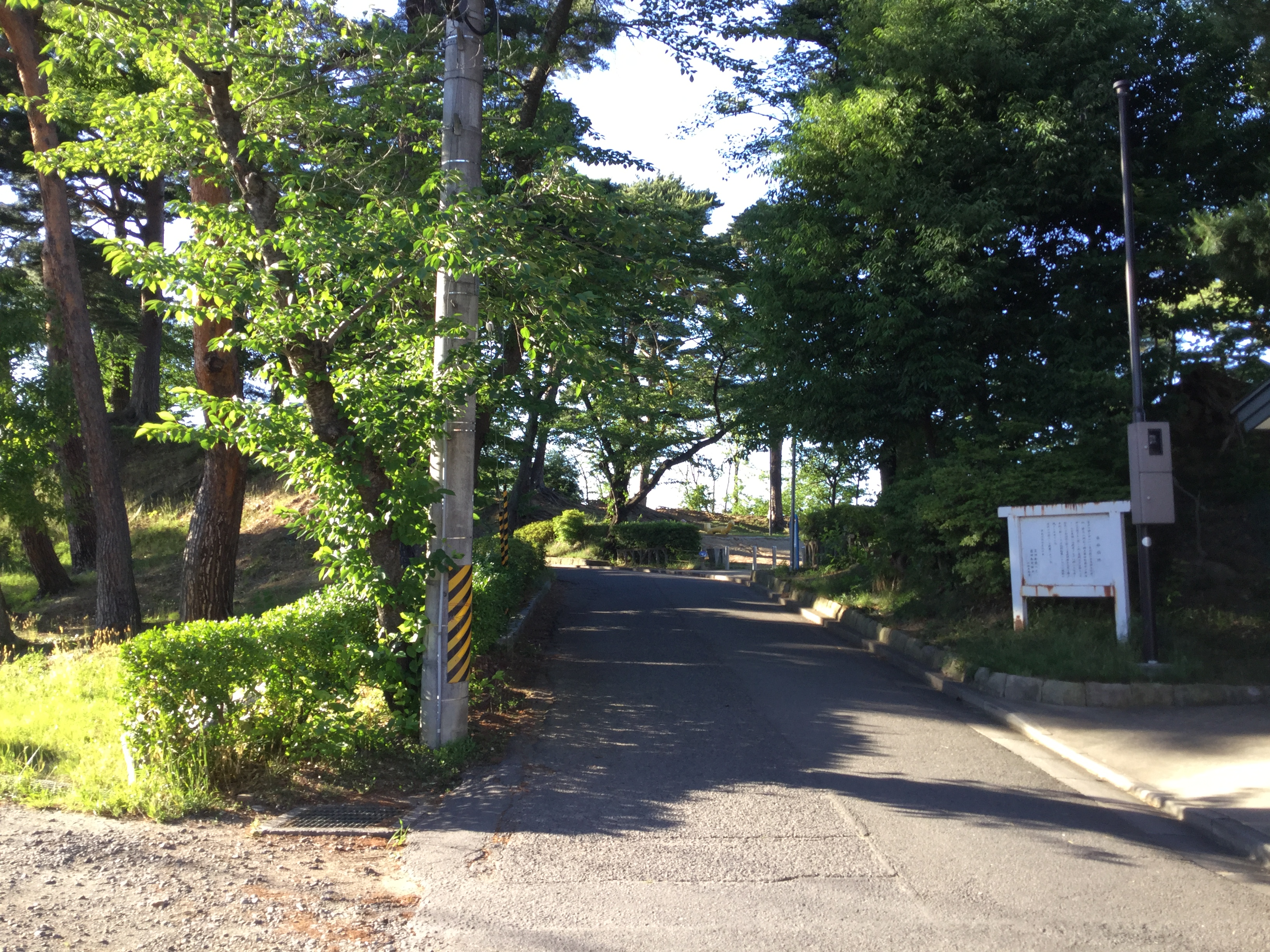 郡山市 水神館 入口